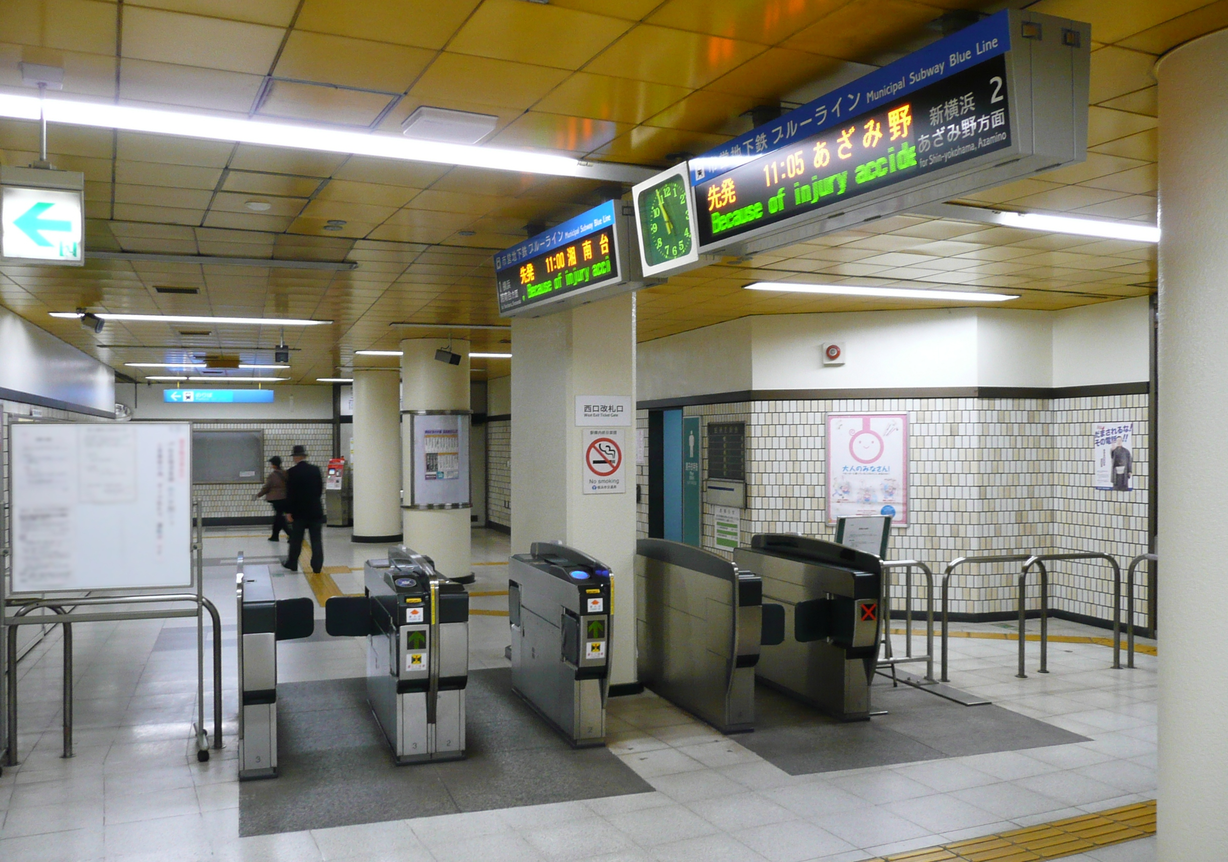 三ツ沢下町駅西口改札口